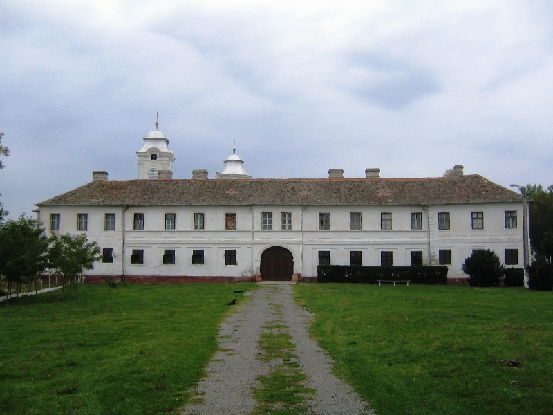 Mănăstirea Bezdin